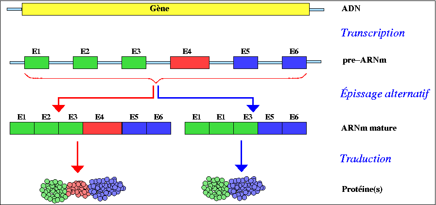 Épissage alternatif d'un gène - schémas explicatif - 2004 Benoit BELY. La version anglaise de cette image a été créée le 28/04/2004 et faire partie d'une présentation public à l'EBI faite par moi-même (Benoit BELY). La modification en version française a été effectuée le 06/07/2004 pour être diffusée sur WikiPedia.